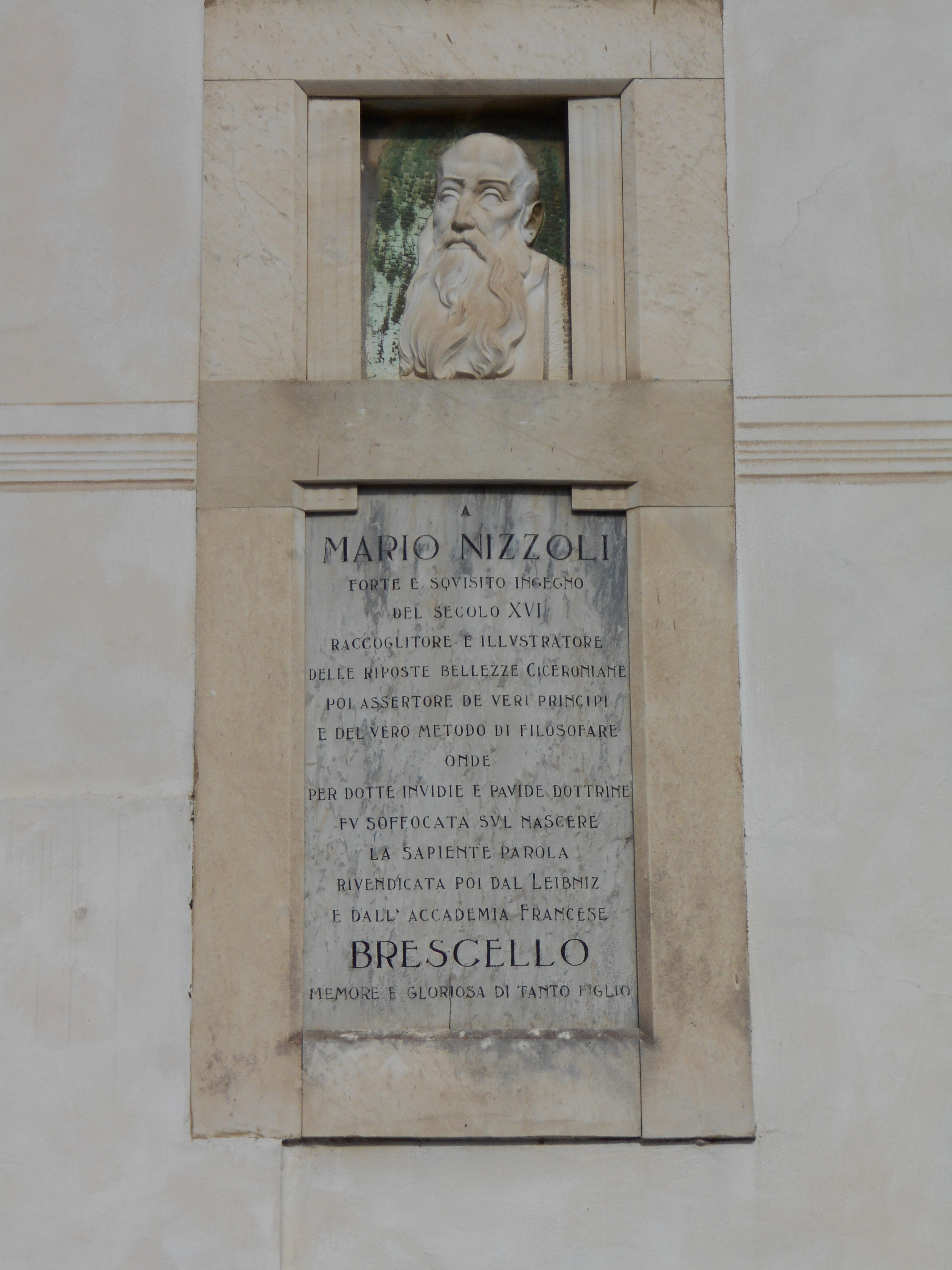 lapide In ricordo di Mario Nizzoli o Mario Nizolio sulla parete del municipio di Brescello